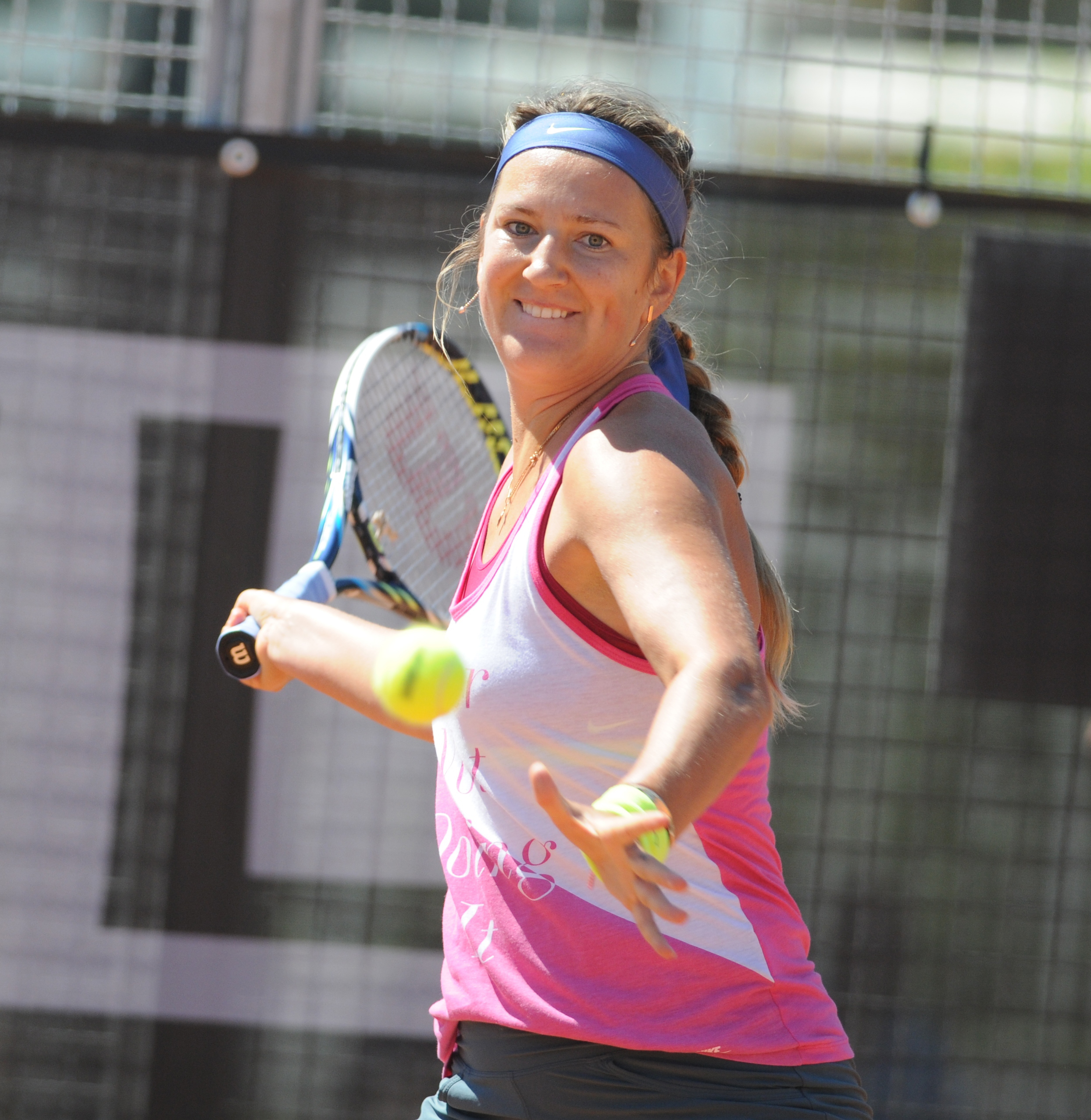 Victoria Azarenka